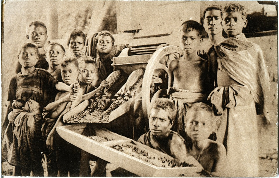 Postal de Timor Leste